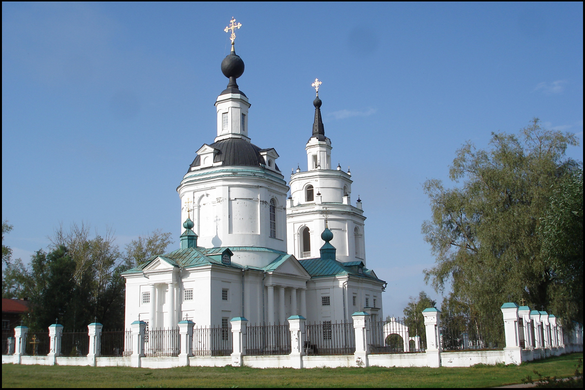 Большое Болдино